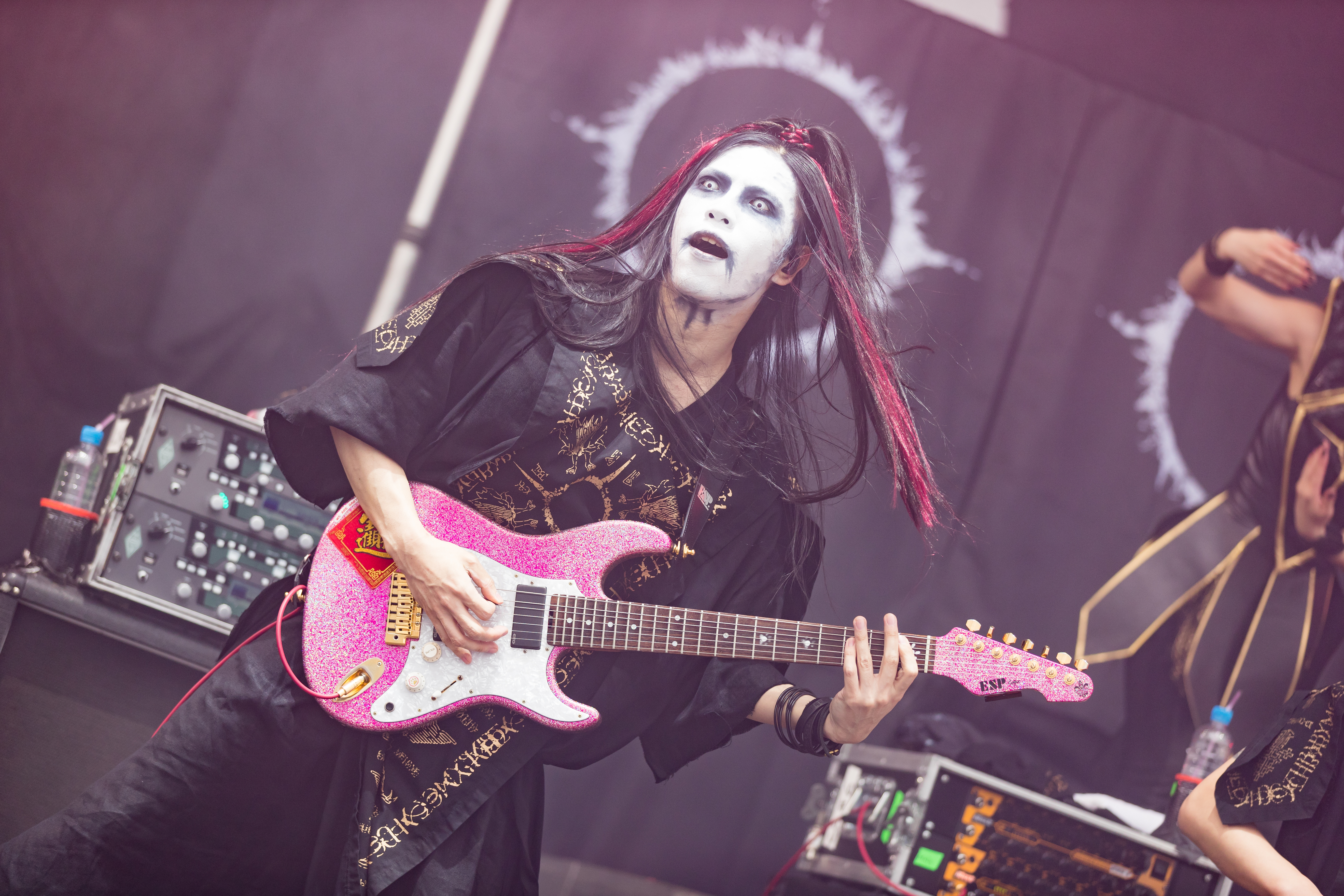 Babymetal @ Rock am Ring 2018